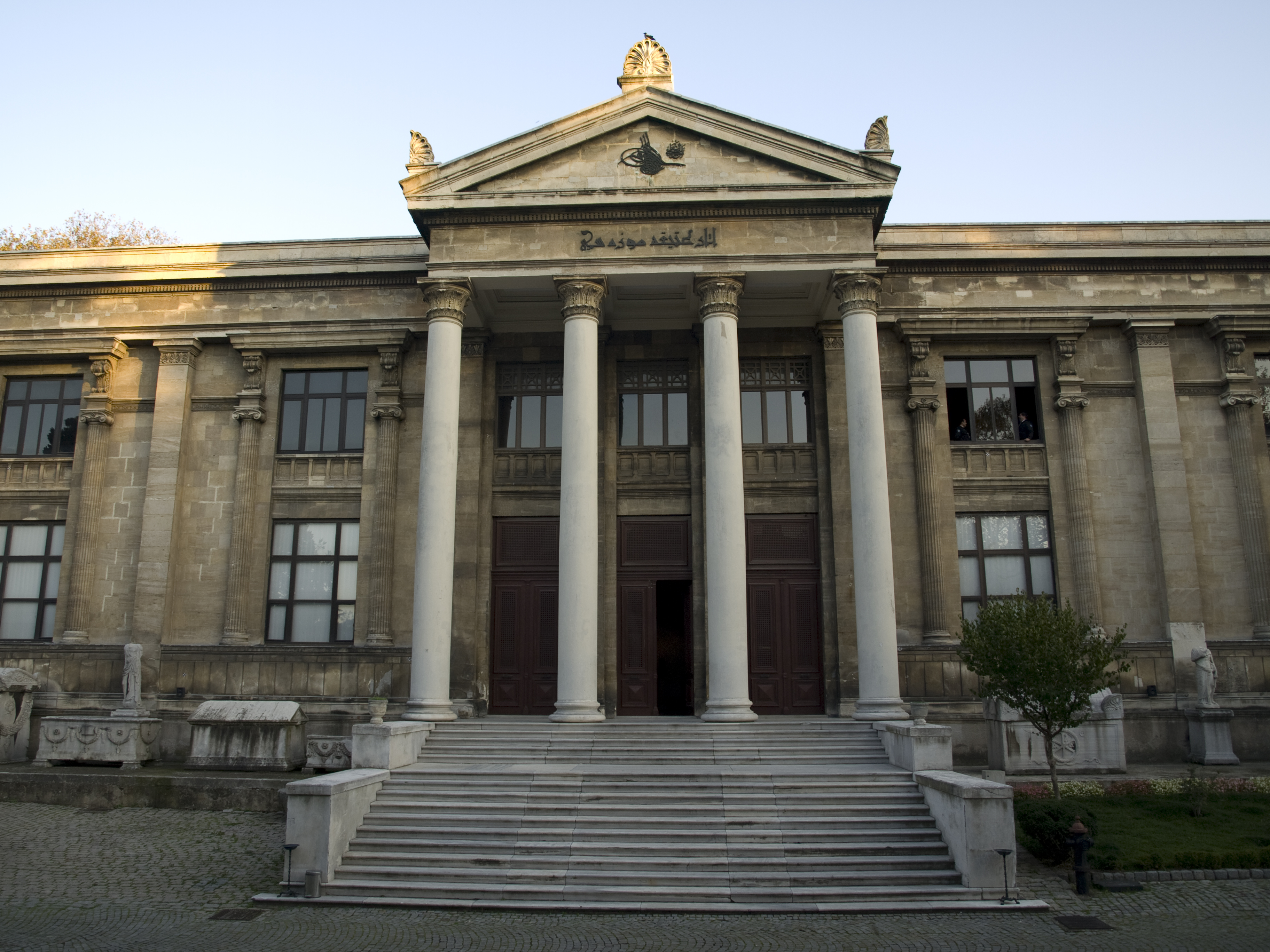 PB076052raw Istanbul, Turkey